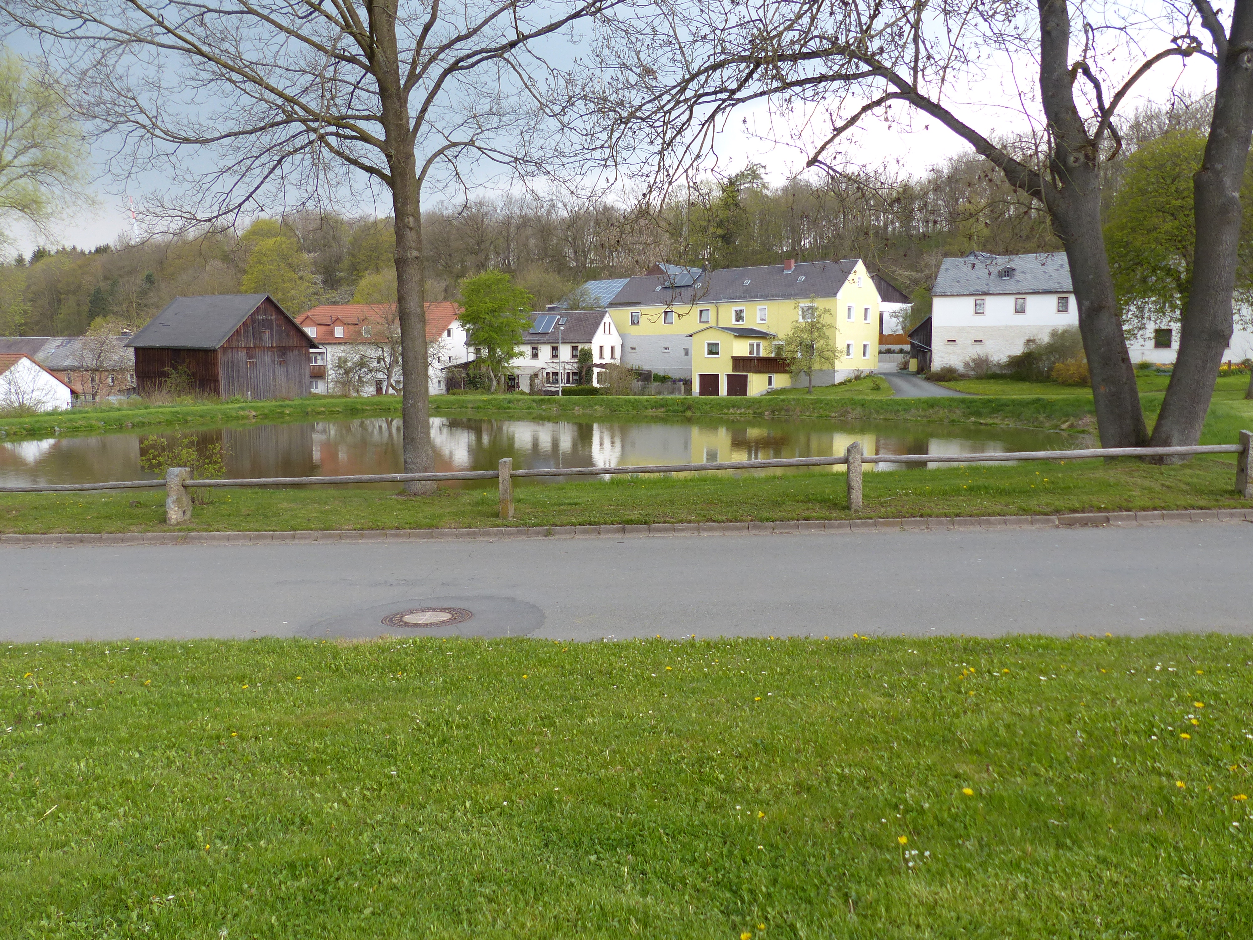 Ortsansicht von Vierschau